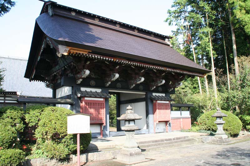 妙蓮寺表門。